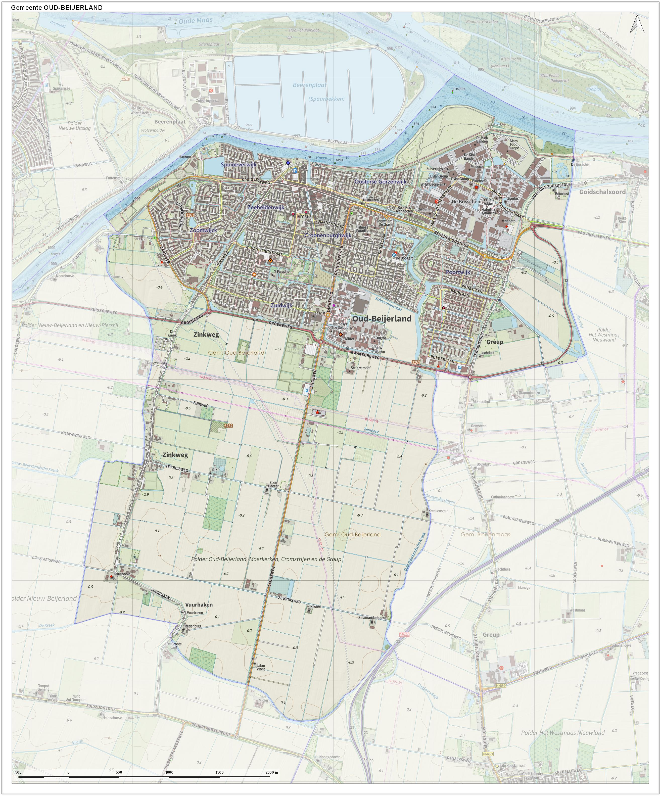 Topografische gemeentekaart. Resolutie: 400 pixels/km. Kaartbeeld samengesteld uit de open geodata van de Top10NL en Top25namen (Kadaster), Creative Commons-BY licentie. Gebouwvlakken uit open geodata BAG extract. Wegen uit de OpenStreetMap, OpenStreetMap community. Reliëfschaduw uit de Actuele Hoogtekaart AHN2. Samenstelling en kleurenschema: Jan-Willem van Aalst, met QGIS. Zie ook de Legenda.